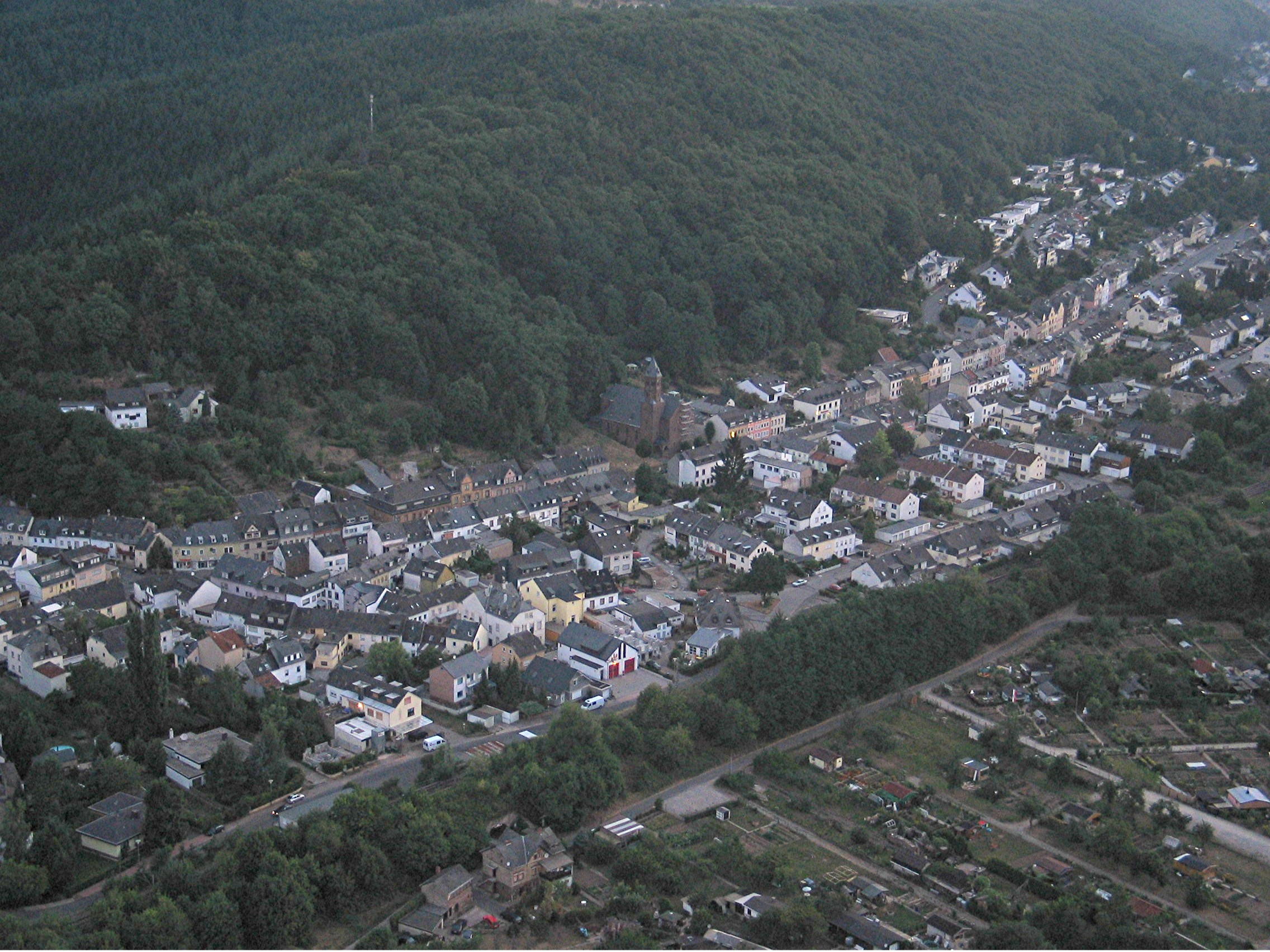 Biewer aus der Luft